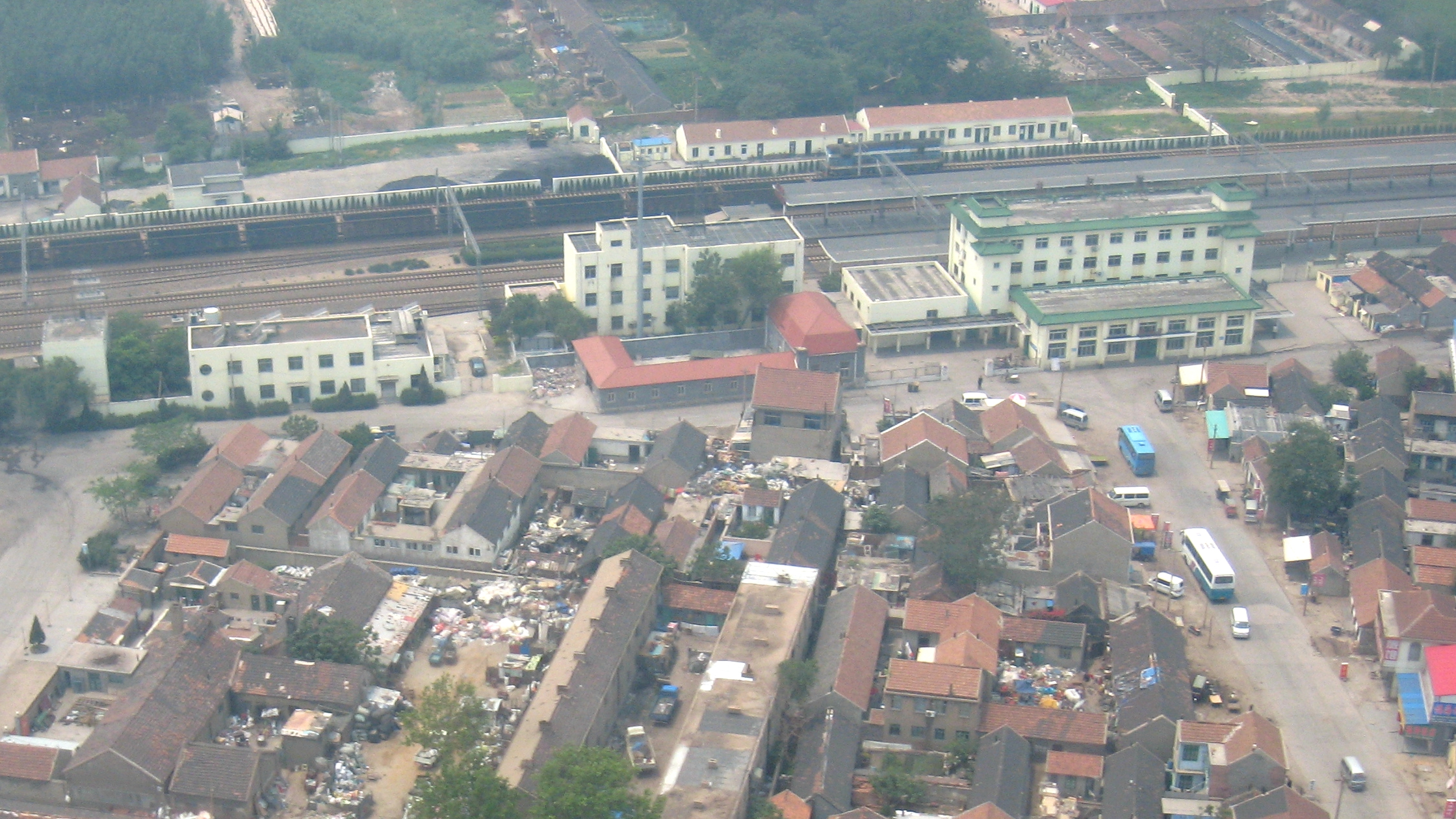 青岛城阳火车站航拍